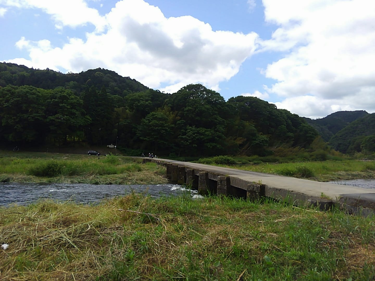 京都府相楽郡南山城村の恋路橋